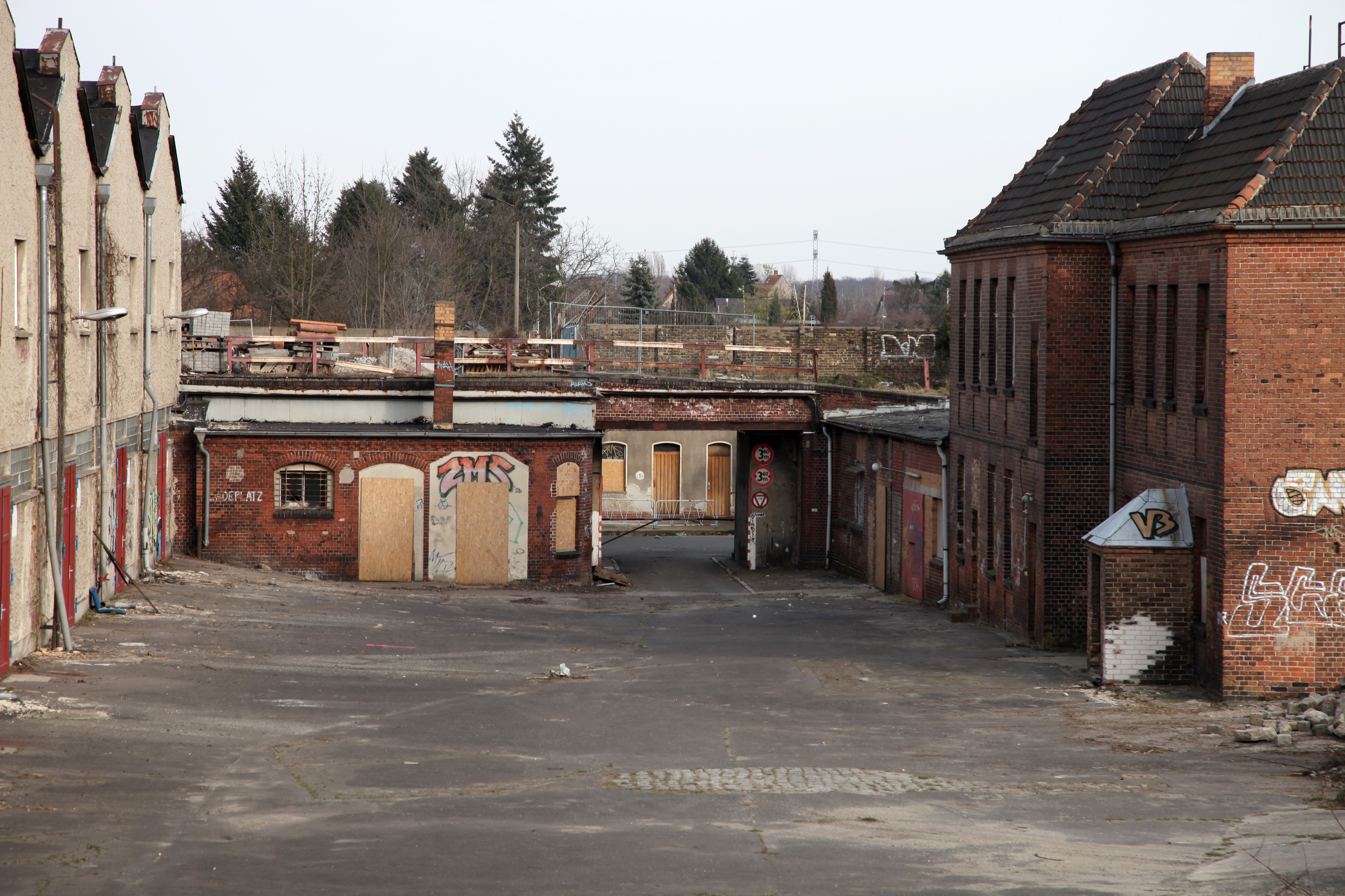 Ehemaliger Magerviehhof Friedrichsfelde, unterer Hof